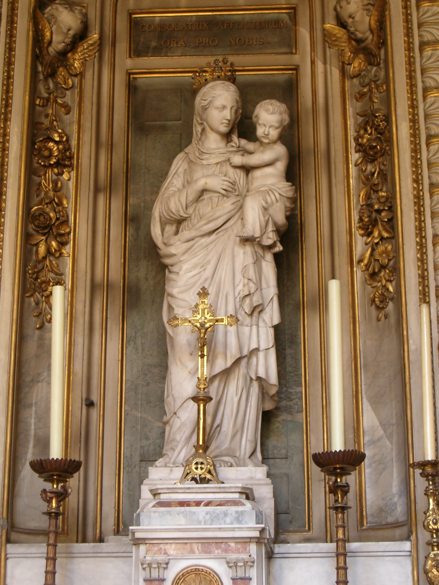 Vierge en albâtre de Joseph-Hugues Fabisch, 1863. Église Saint-Bruno des Chartreux, Lyon, France. Au dessus est écrit en latin: CONSOLATRIX AFFLICTORUM ORA PRO NOBIS.